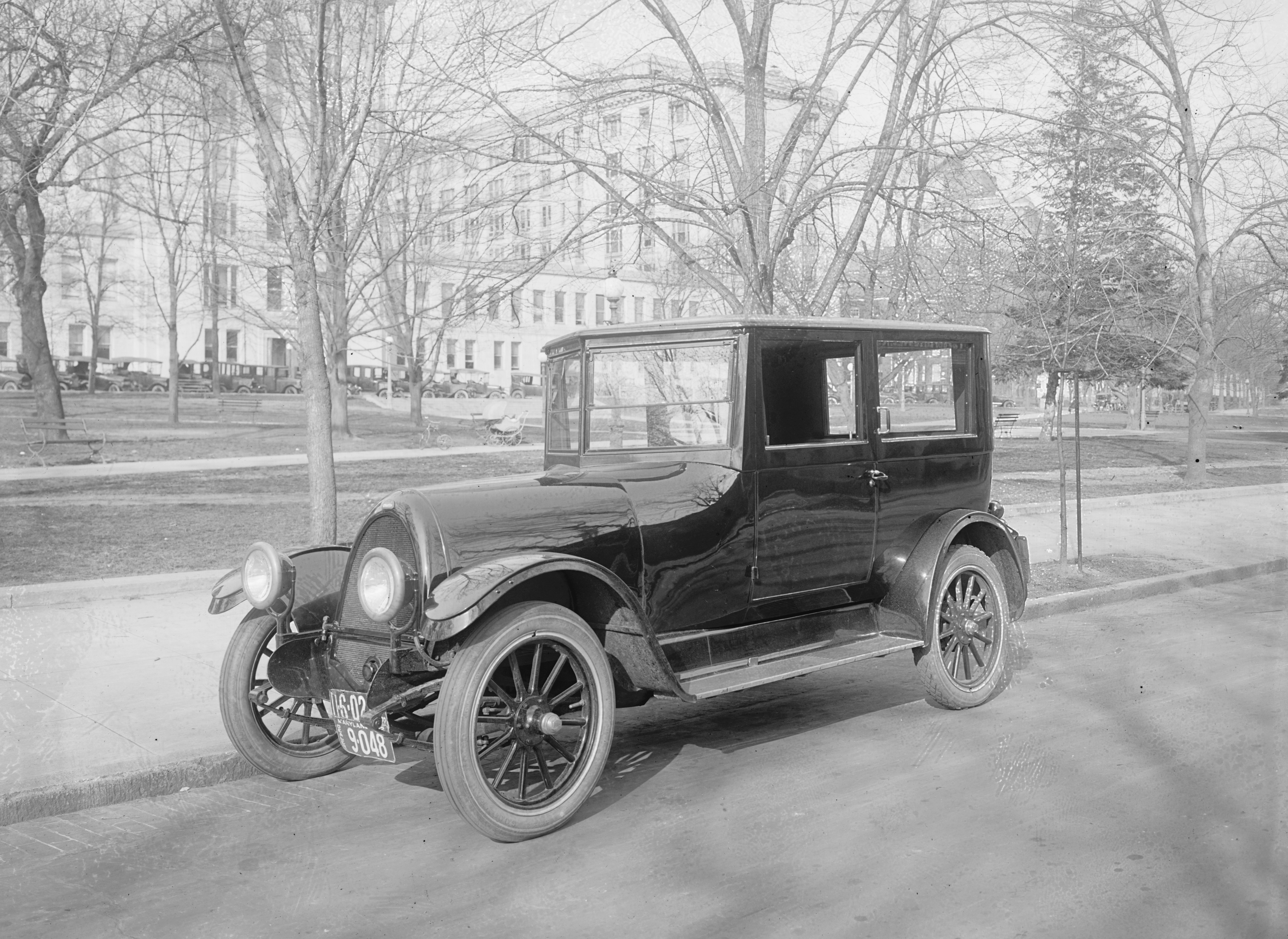 Franklin sedan, 1922